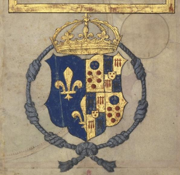 Escudo de armas de Catalina de Médici, reina de Francia, con "cordelière de veuve" que señala que se encontraba viuda en ese momento.